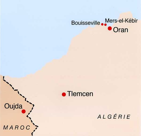 Carte très sommaire d'Oujda (Maroc) à Oran (Algérie)